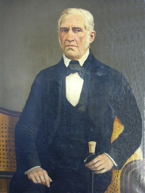 Eustoquio Díaz Vélez. Retrato al óleo sobre tela pintado por Benjamín Franklin Rawson. Medidas: 109 por 85 cm. Año de 1856. Complejo Museográfico Provincial "Enrique Udaondo". Ciudad de Luján. Provincia de Buenos Aires. República Argentina. Donación de don Carlos Díaz Vélez, nieto del prócer.